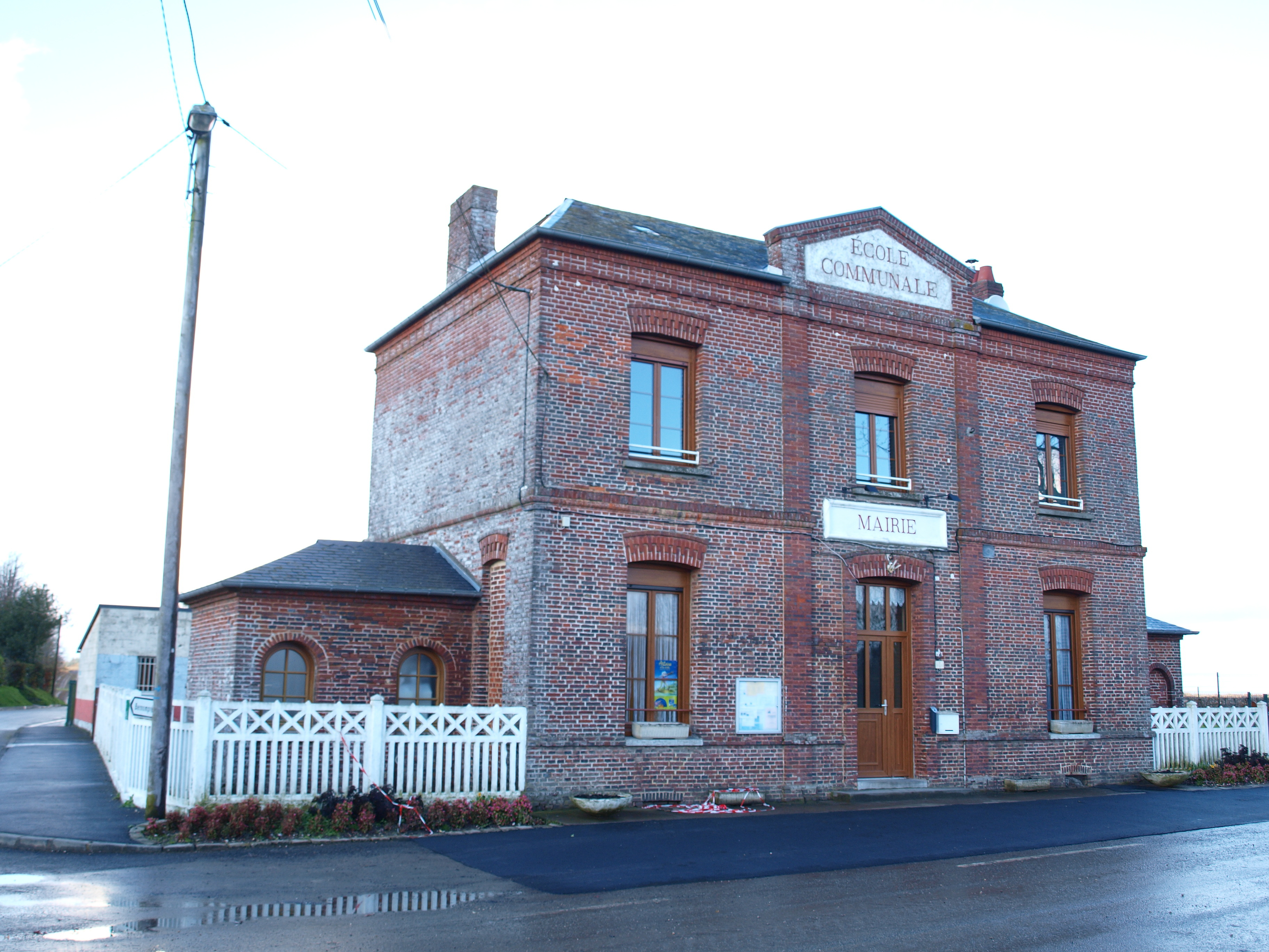 Nullemont (Seine-Maritime , France) ; la mairie